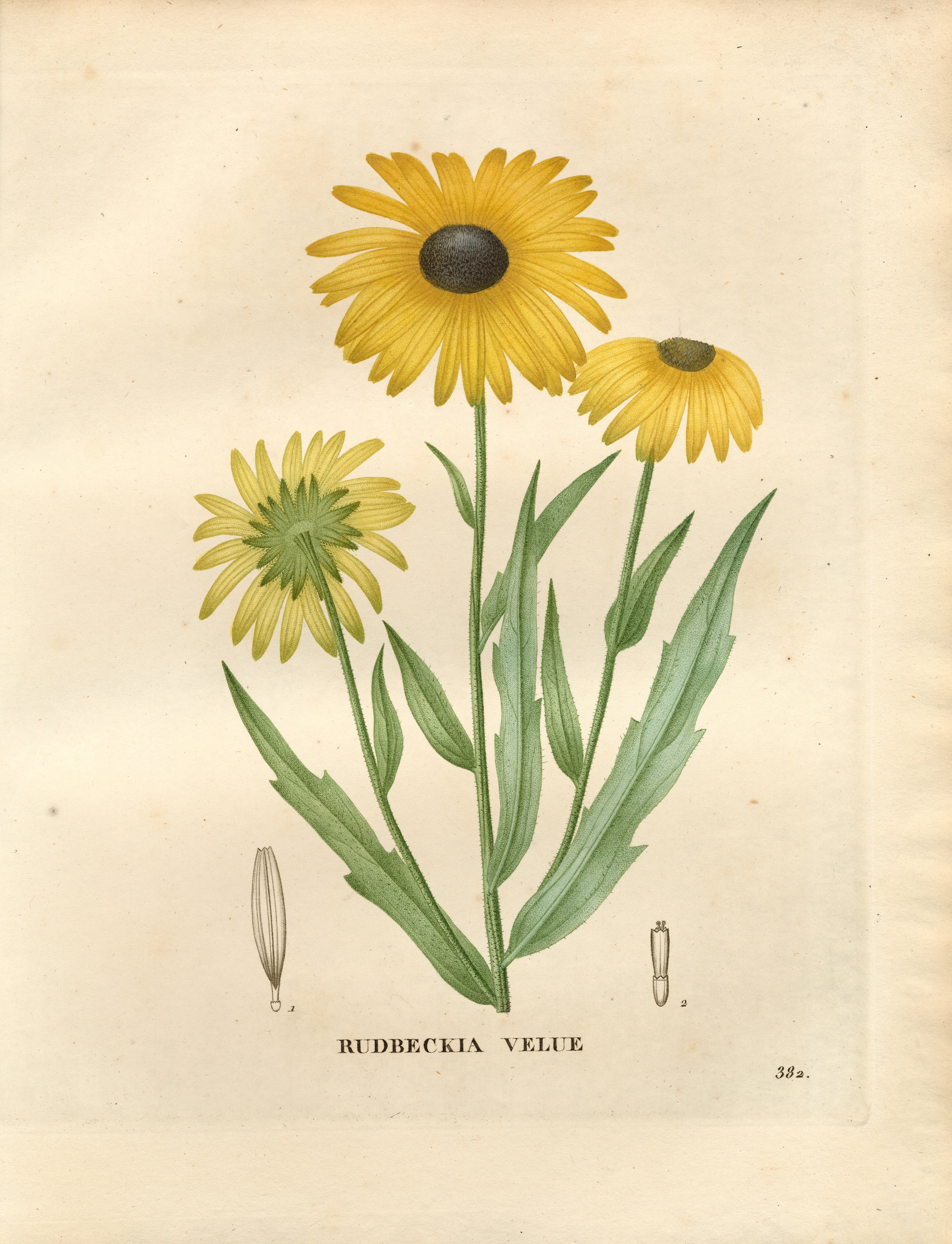 Legende: Oberer Teil der Pflanze. 1 Strahlenblüte. 2 Röhrenblüte.